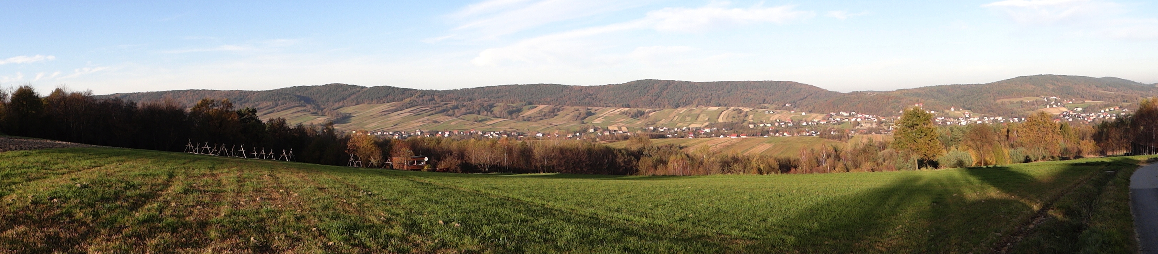 Widok z Sołtysich Gór na Pasmo Szpilówki